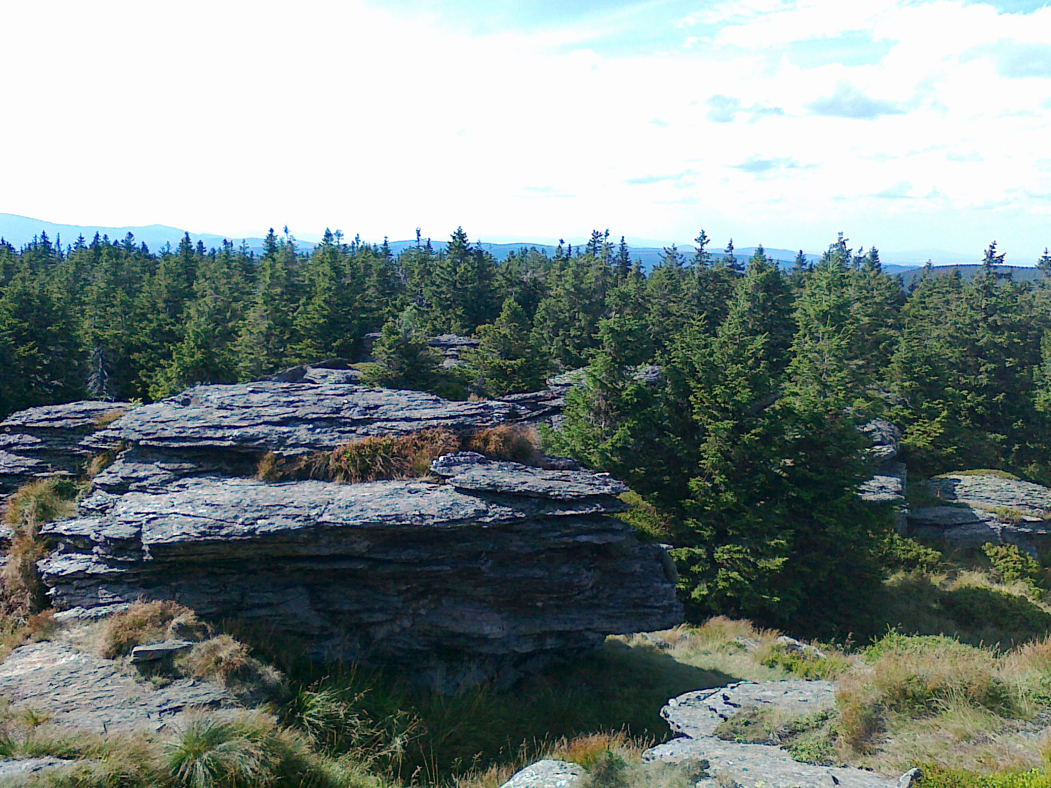 Grupa skalna na szczycie góry Vozka - 1377 m n.p.m.